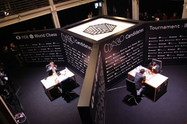 Турнирный зал, Турнир Претендентов 2018